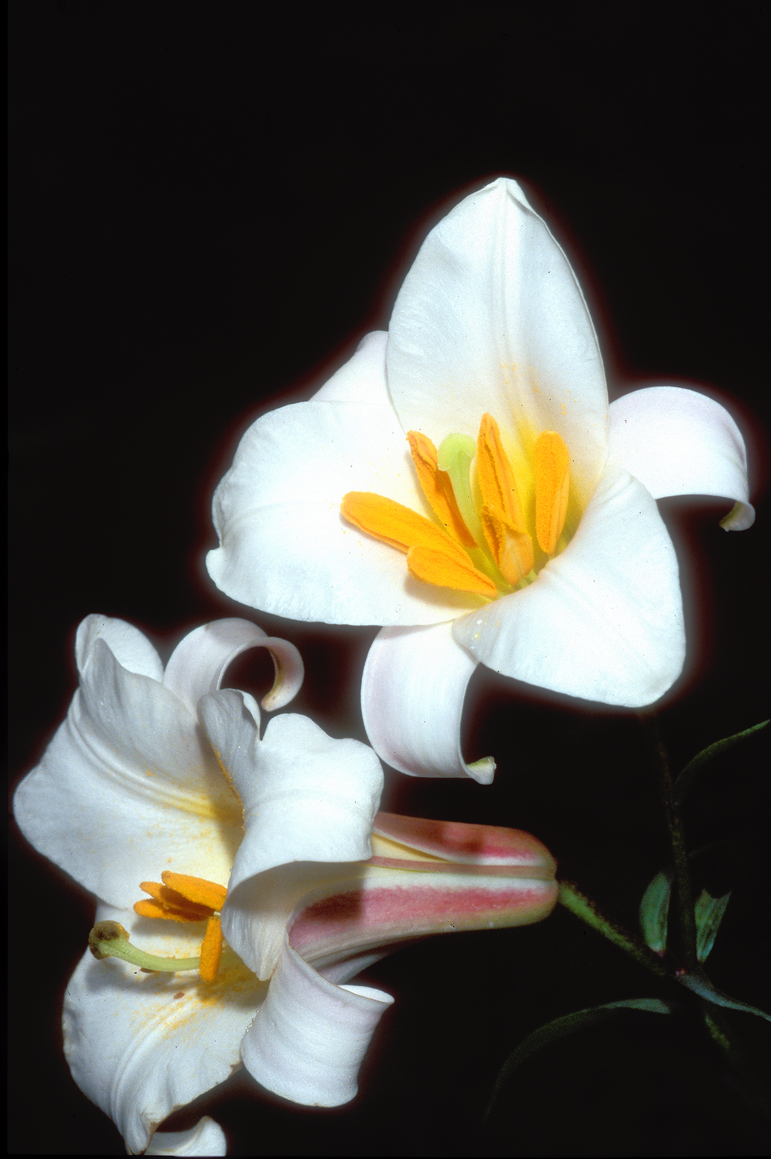 Lilium regale in habitat, Wolong, Sichuan, China